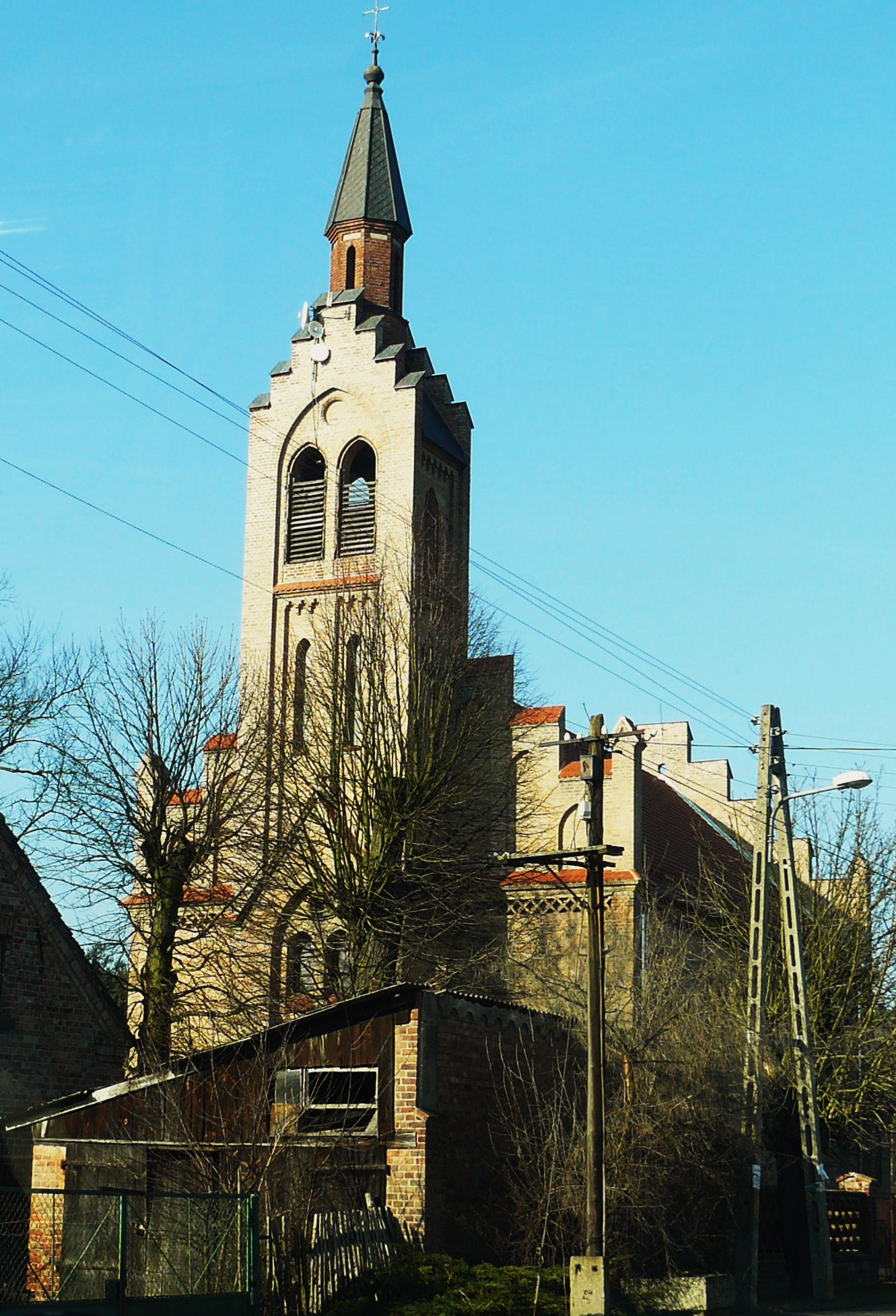 Kościół MB Królowej Polski w Świniarach - parafia Skwierzyna.